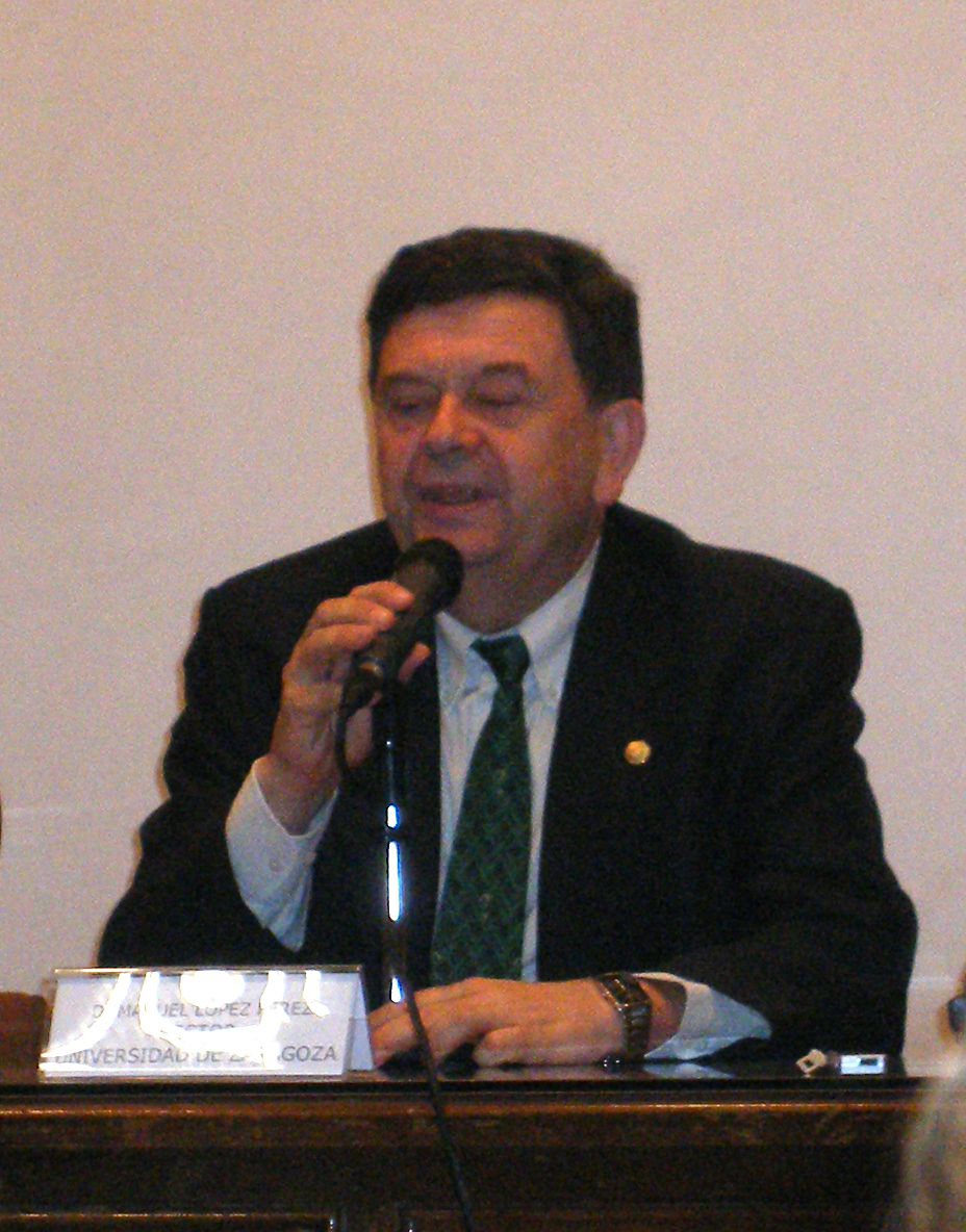 Aragonés: Manuel López Pérez, retor d'a Unibersidat de Zaragoza, en a presentazión de l'Academia de l'Aragonés en a Unibersidat de Zaragoza.